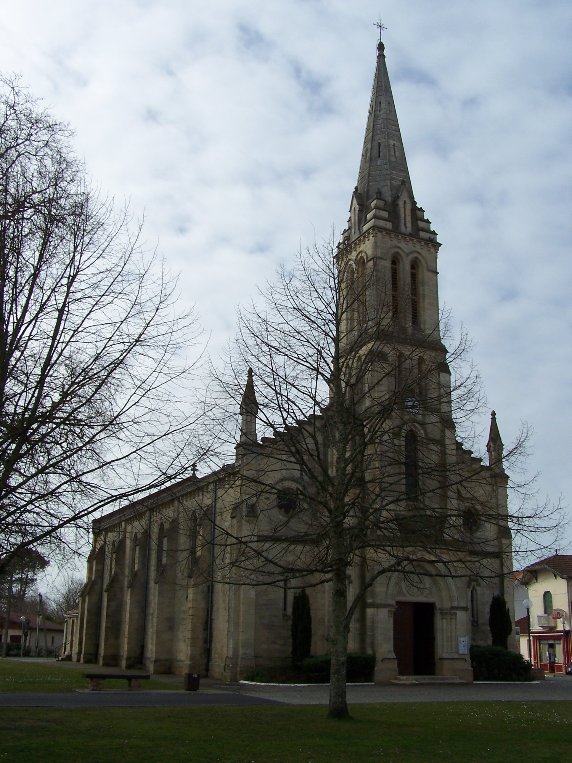 Église du Porge, Gironde, France